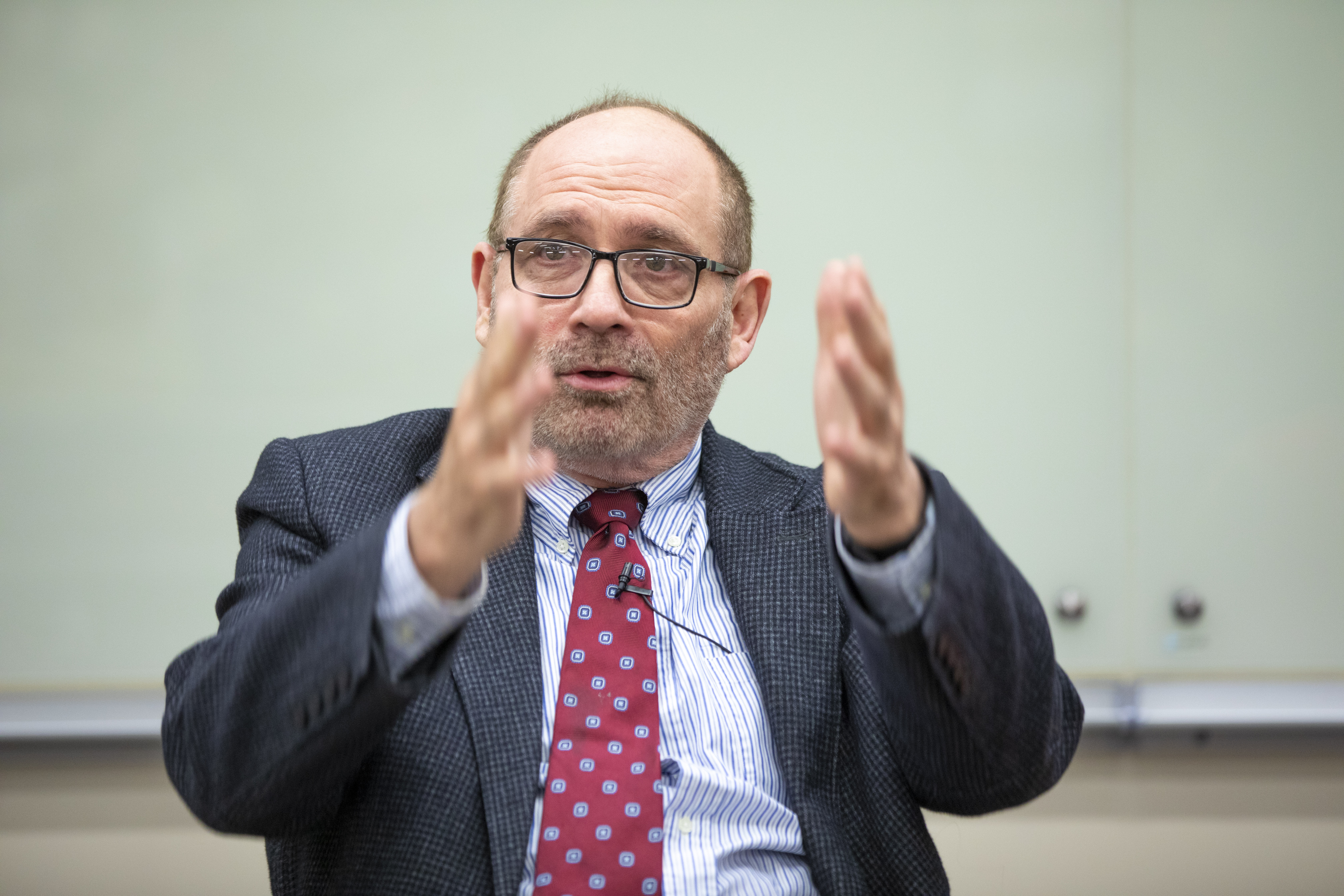 482A9957